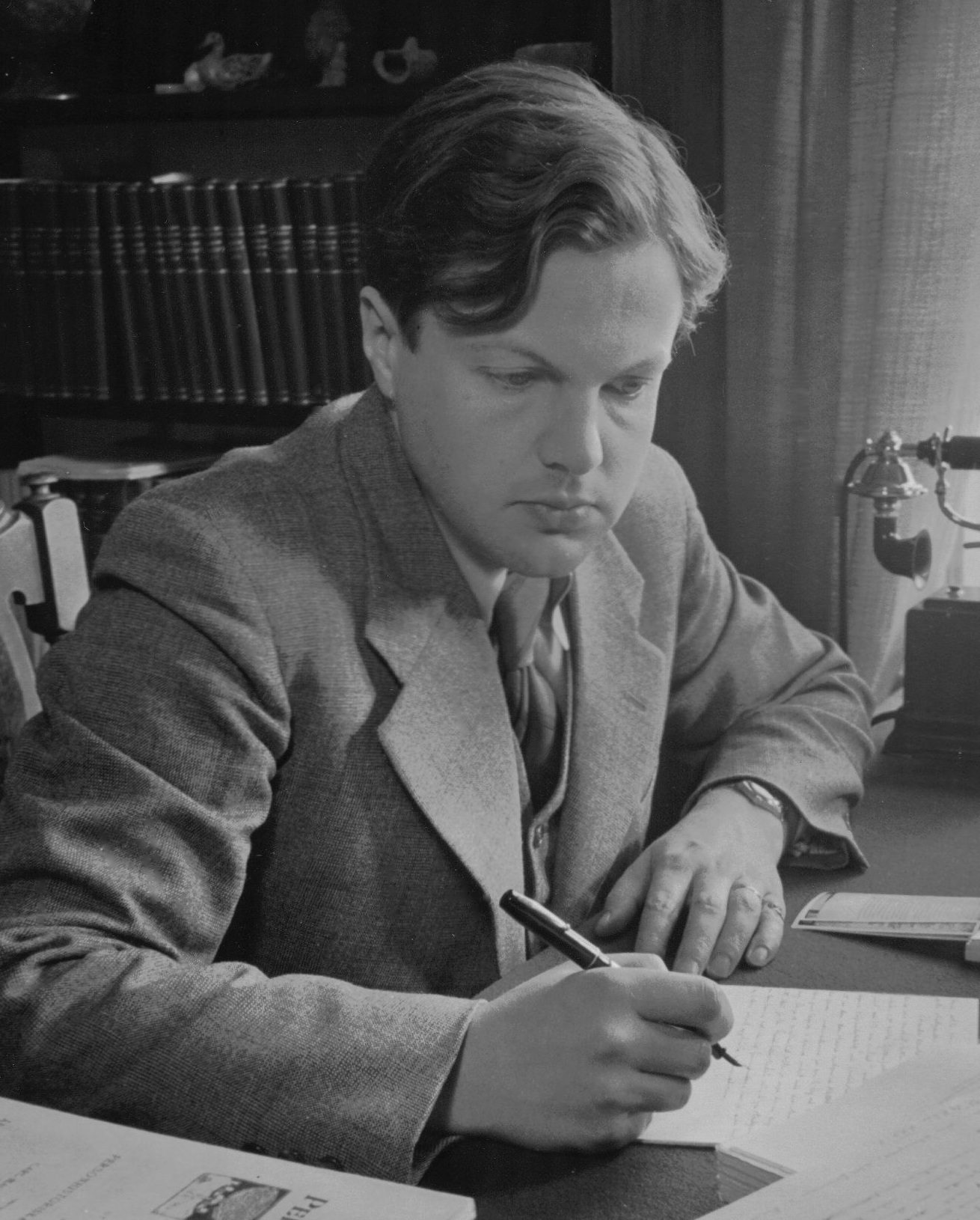 Professor Sven Ulric Palme. Foto från ca 1945.